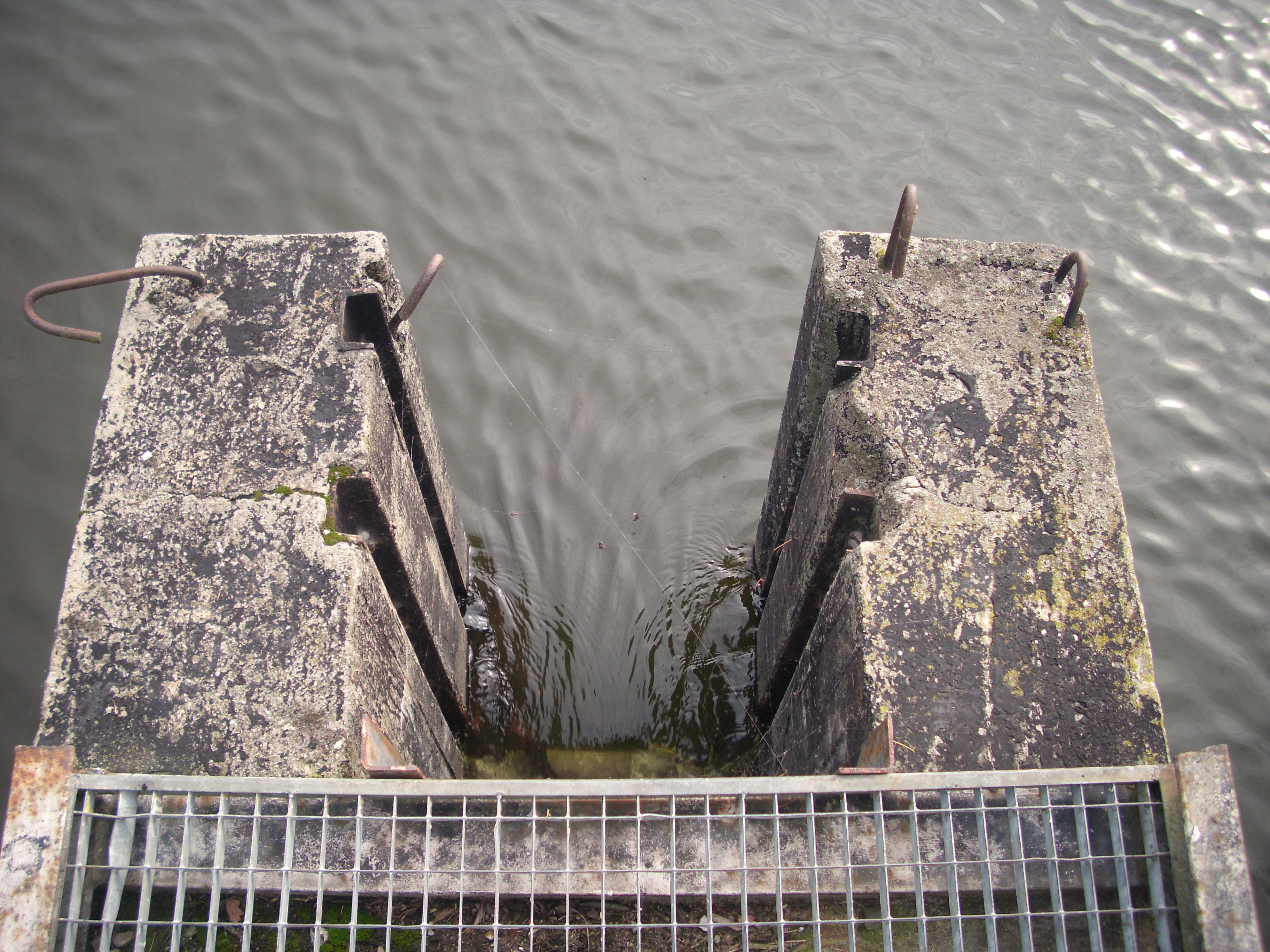 Mönch des Klingeteiches, Klingemühle in Friedland, Naturpark Schlaubetal, Brandenburg